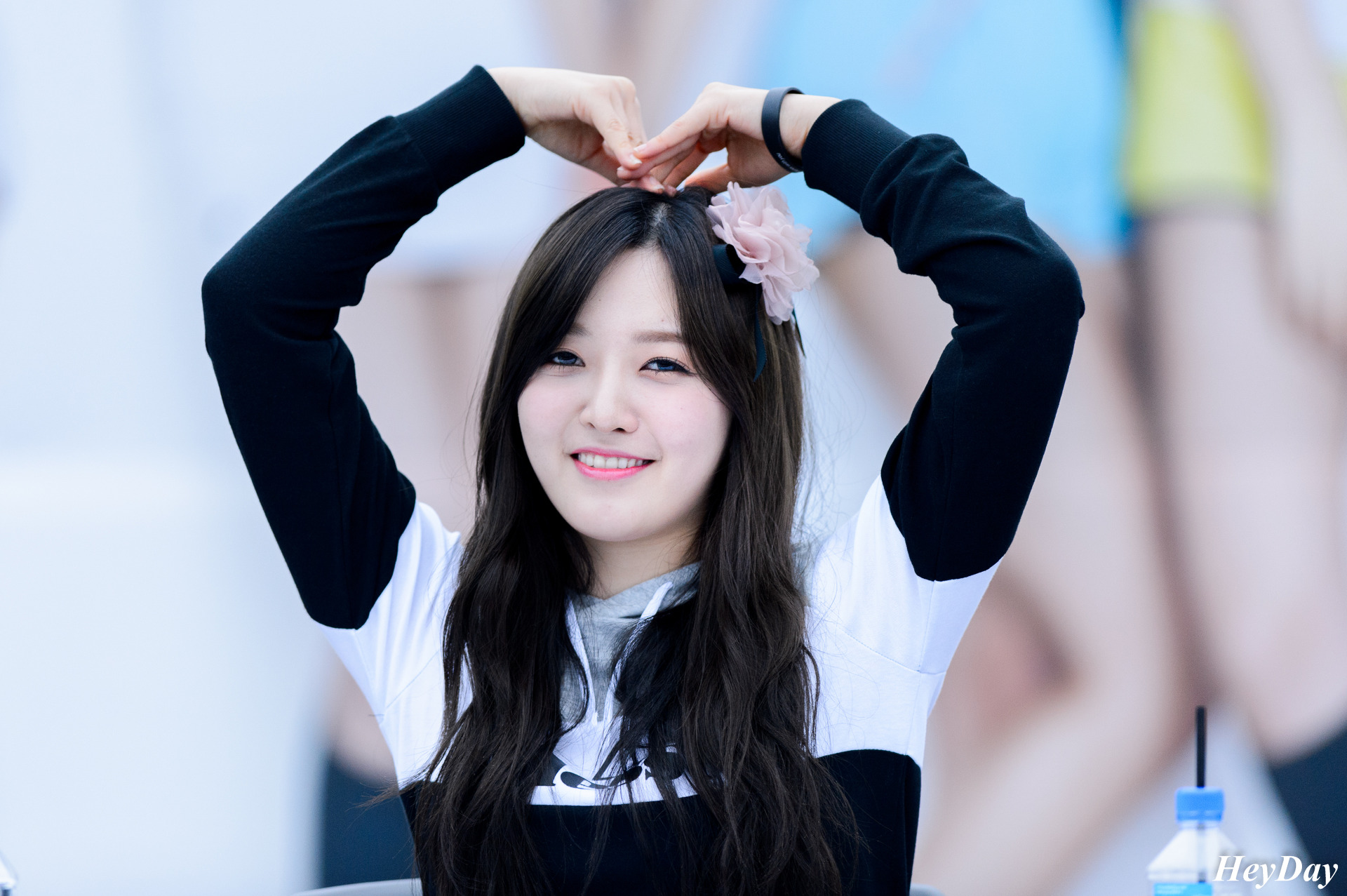 Chanmi von AOA bei der Autogrammstunde der Sportmarke Ellesse am 8. April 2016 in Seoul.